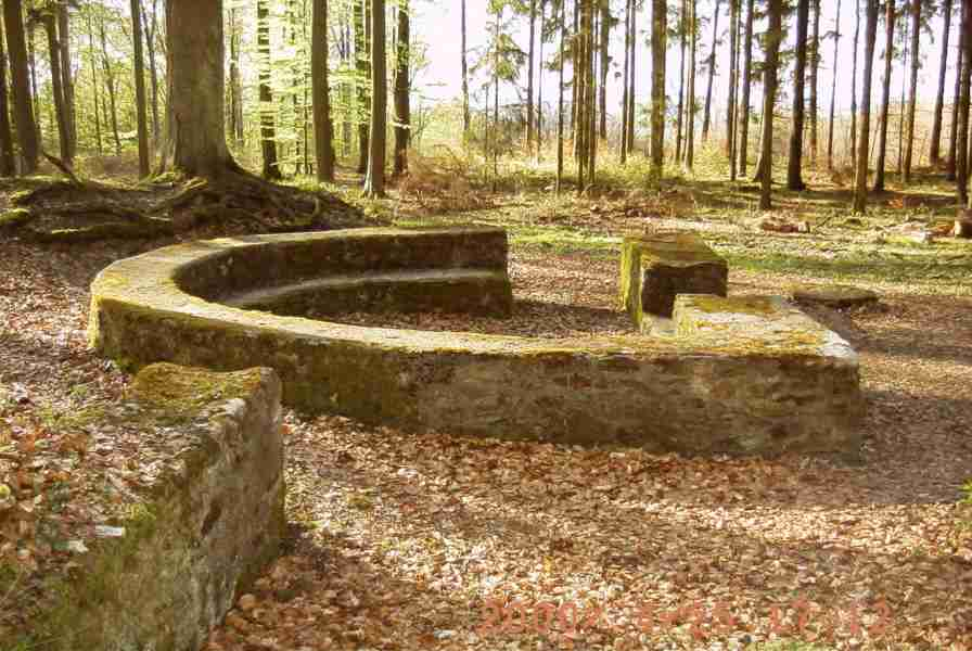 Reste des Römerkastells in Holzhausen an der Haide